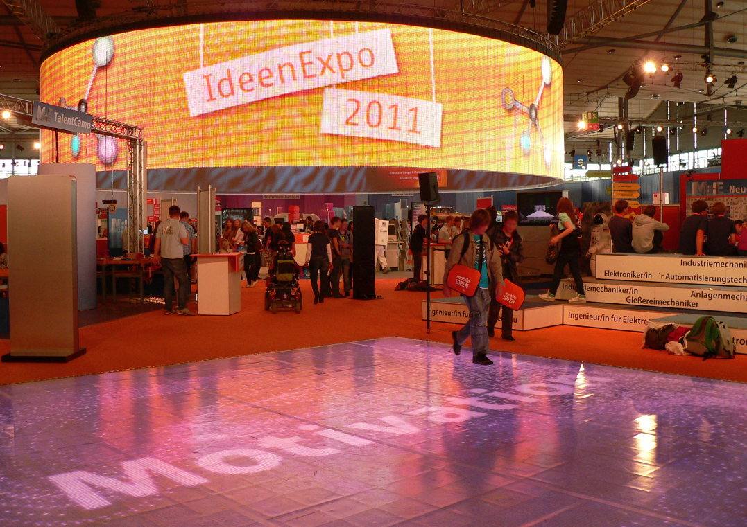 Ideenexpo2011